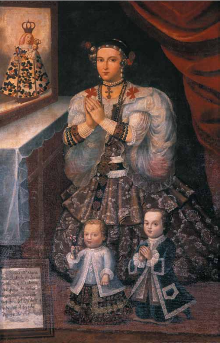 Retrato de Rosa Larrea-Zurbano y Santa Coloma, esposa del primer marqués de Selva Alegre, en el que aparece junto a sus hijos menores: Ignacio y Joaquín